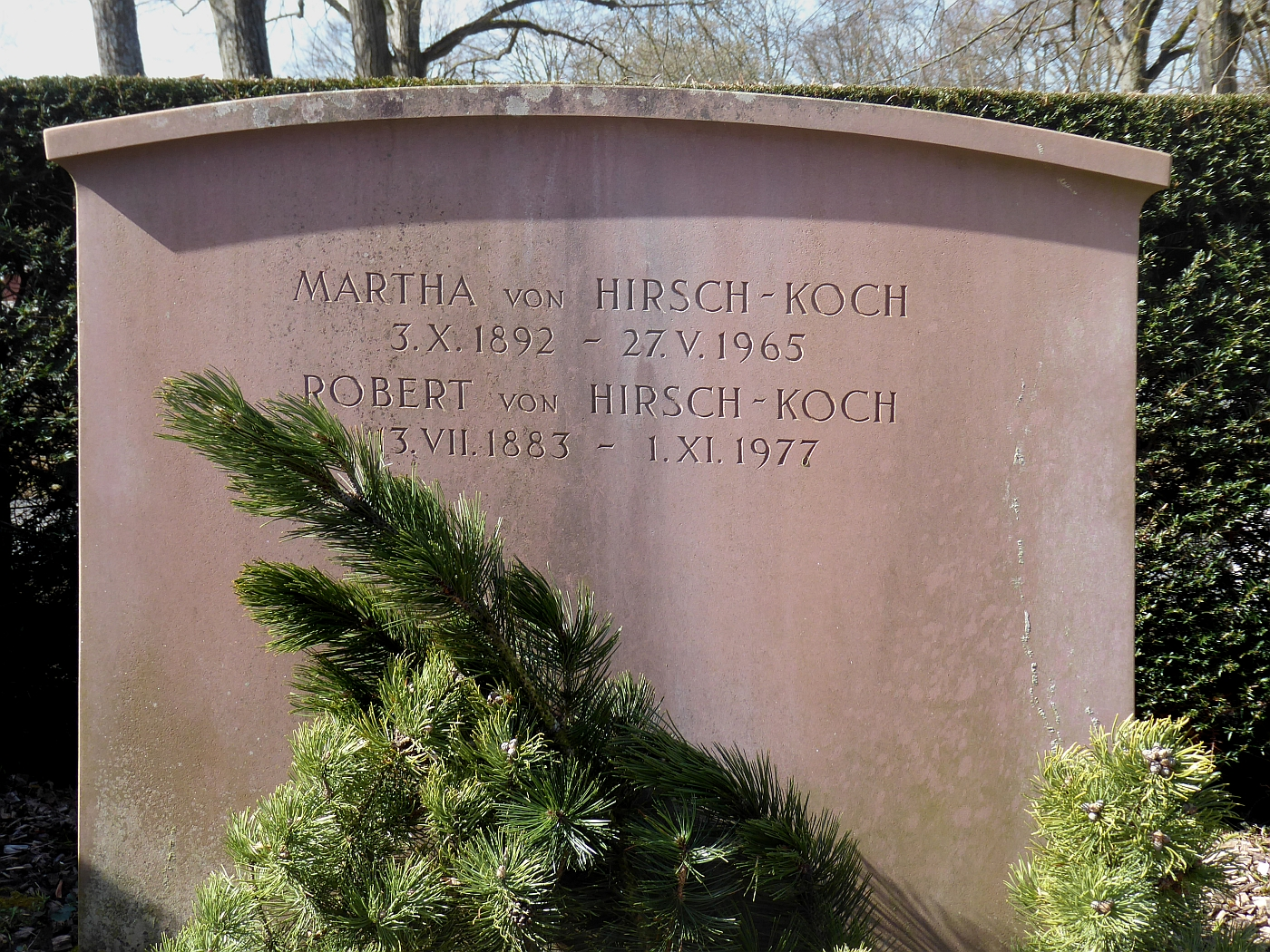 Robert von Hirsch-Koch (1883–1977) Lederfabrikant, Kunstsammler, Mäzen, Dr. h.c. der Universität Basel, Grab auf dem Friedhof Hörnli, Riehen, Basel-Stadt